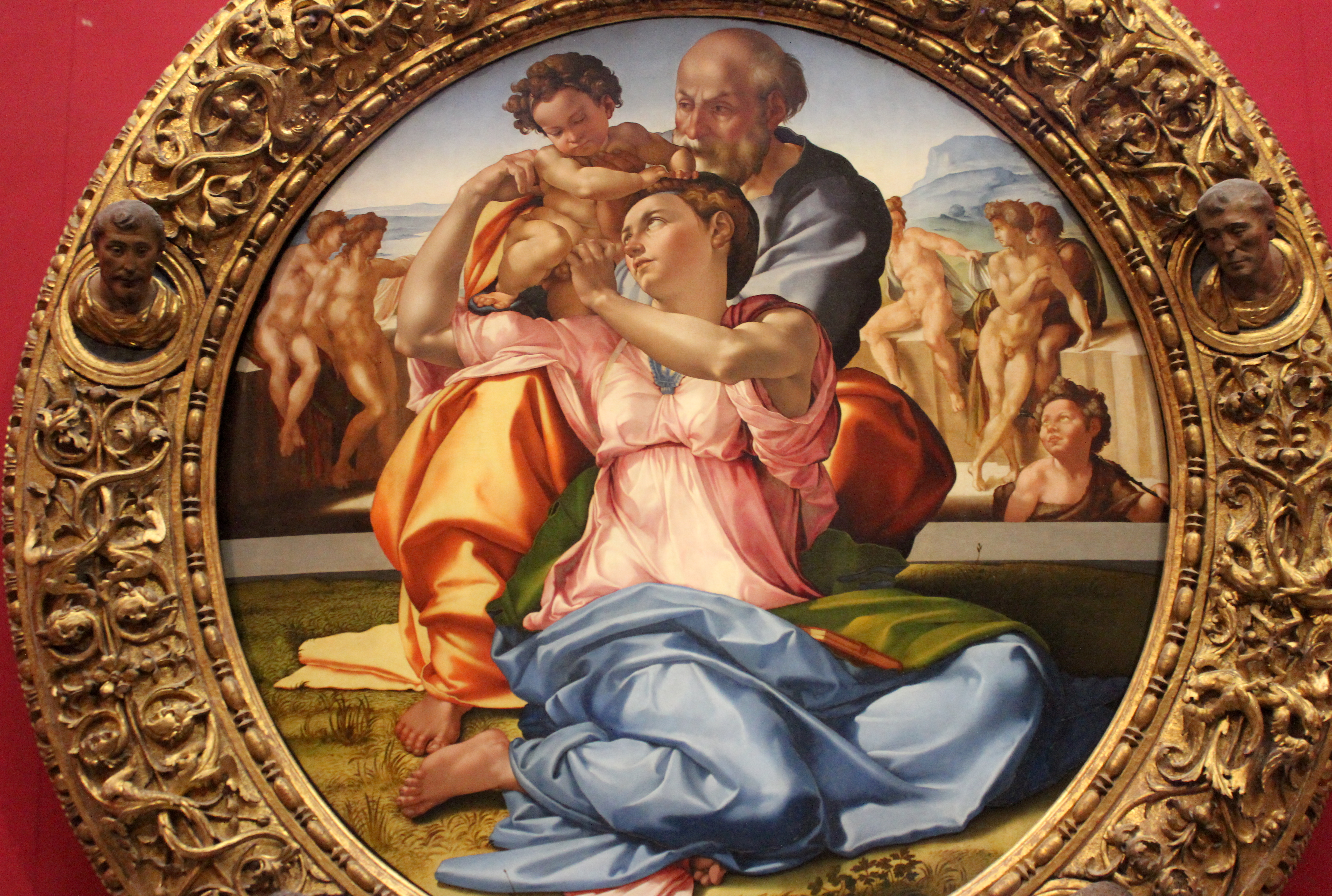 Miguel Ángel. Tondo Doni. Uffizi.